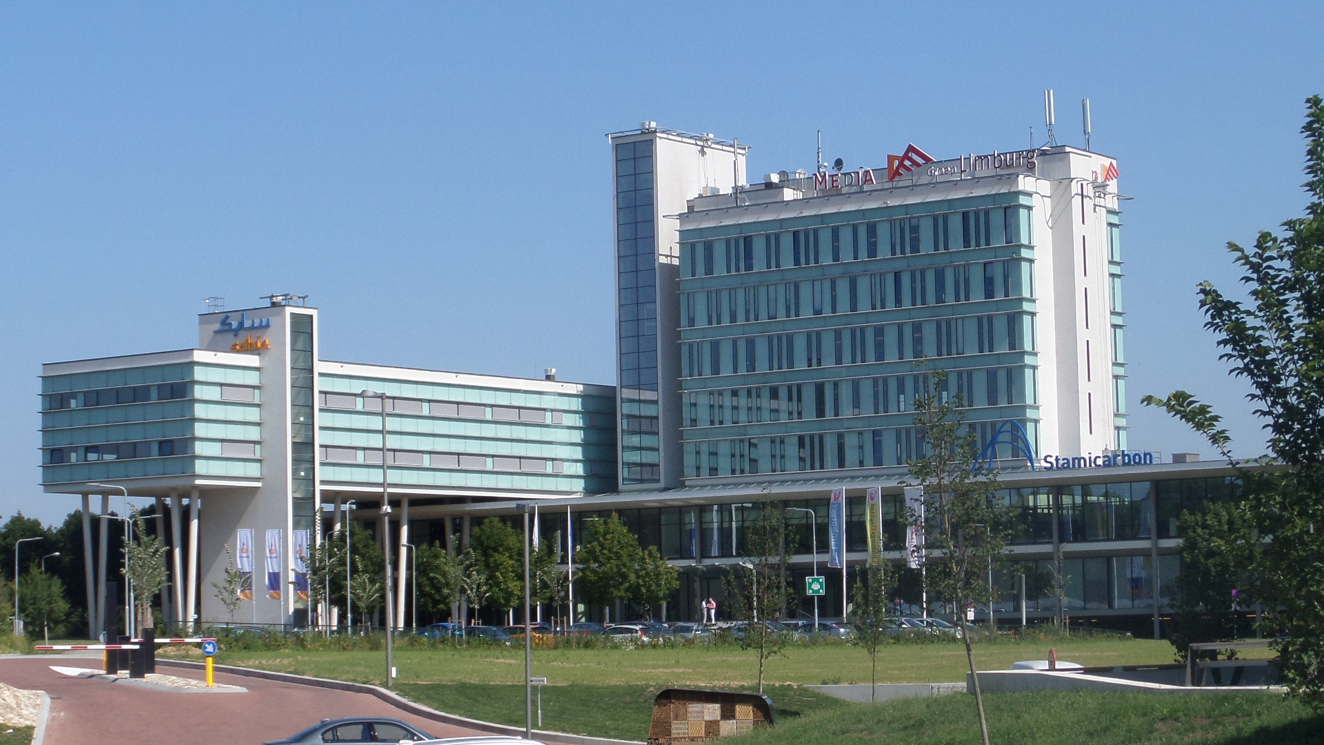 Het MGL-gebouw van de Media Groep Limburg aan de Mercator te Sittard